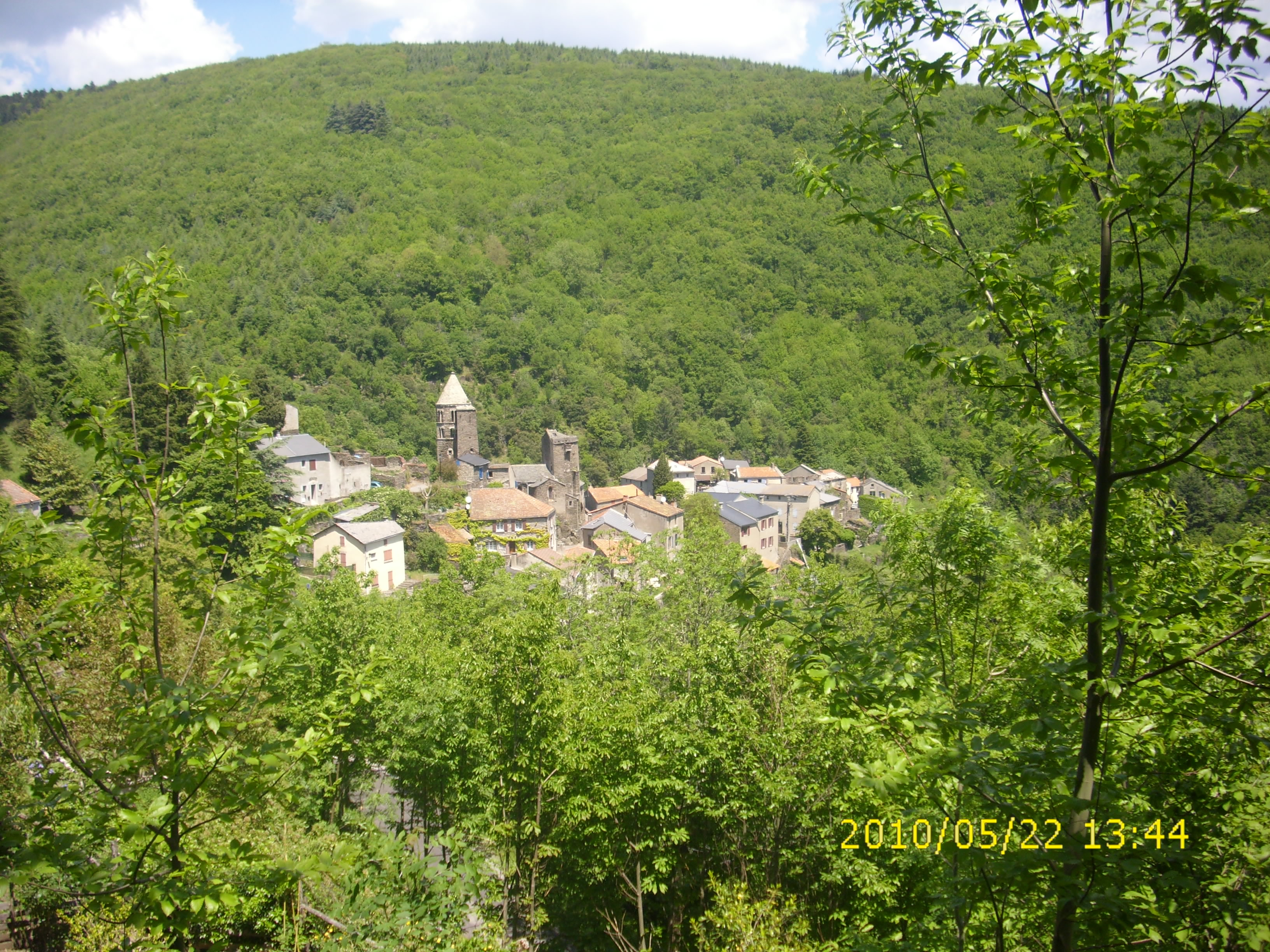 Photo du village de La Tourette-Cabardès.